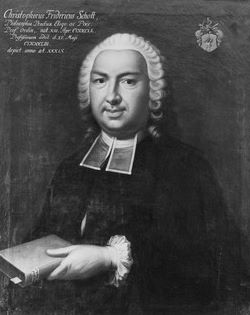 Gemälde in der Tübinger Professorengalerie